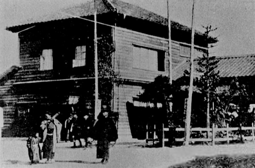 宇部軽便鉄道宇部新川駅（初代）。現在の宇部興産ビル付近。